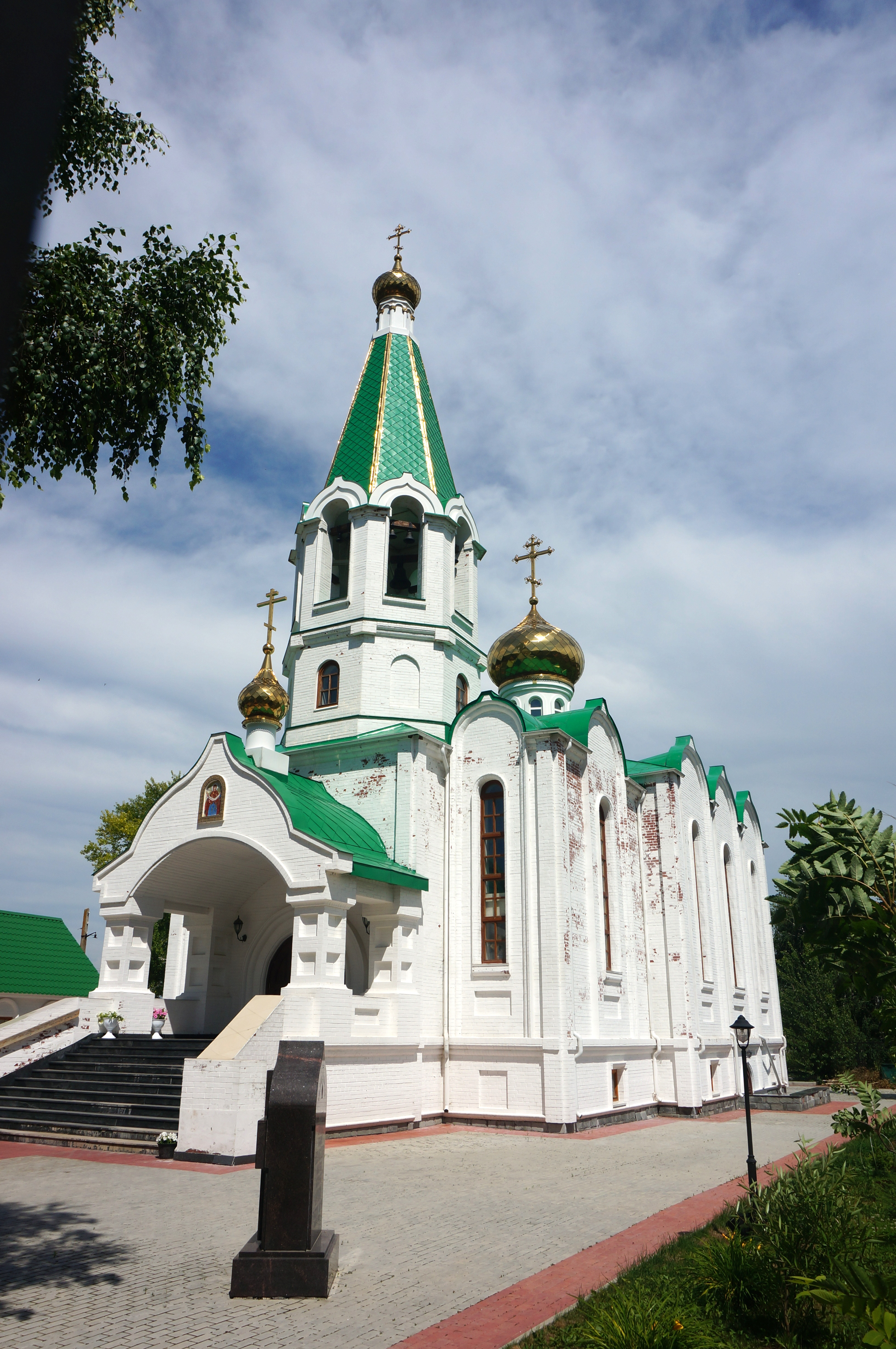 Храм в честь Покрова Божией Матери. Ташёлка